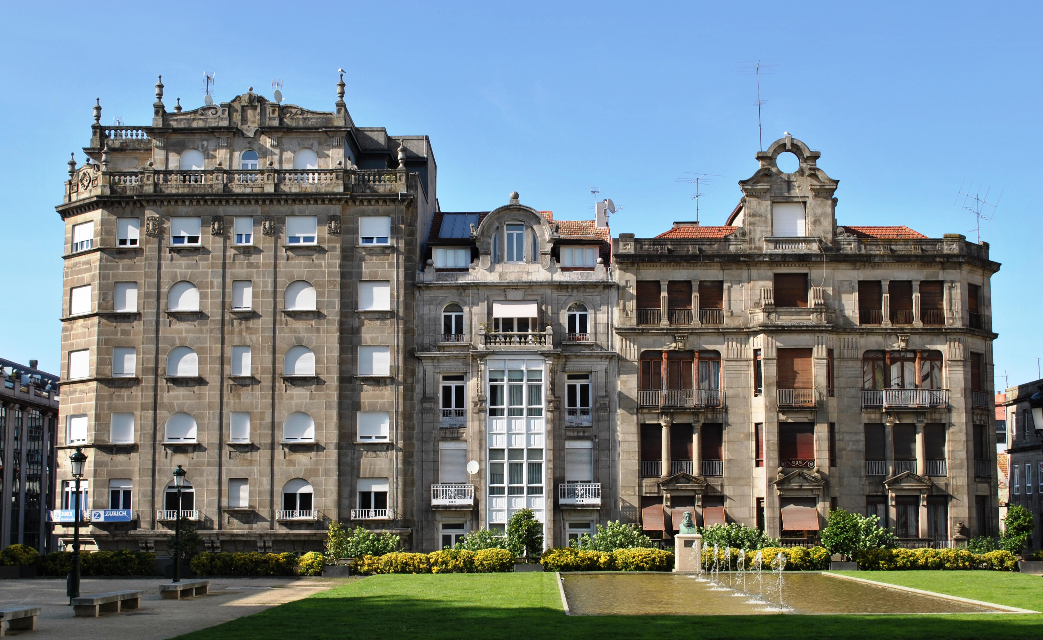 Véxase o título e as categorías.